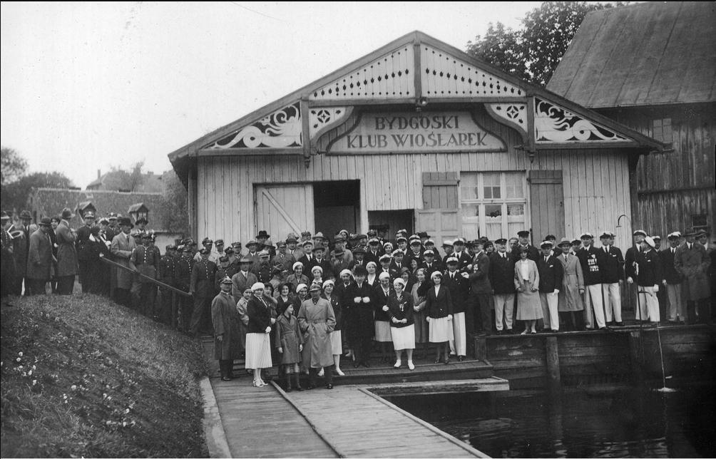 Zawodniczki Bydgoskiego Klubu Wioślarek przy swojej ówczesnej przystani (wcześniej należącej do Kgl. Realgymnasium), niedaleko Mostu Bernardyńskiego - 1932 rok